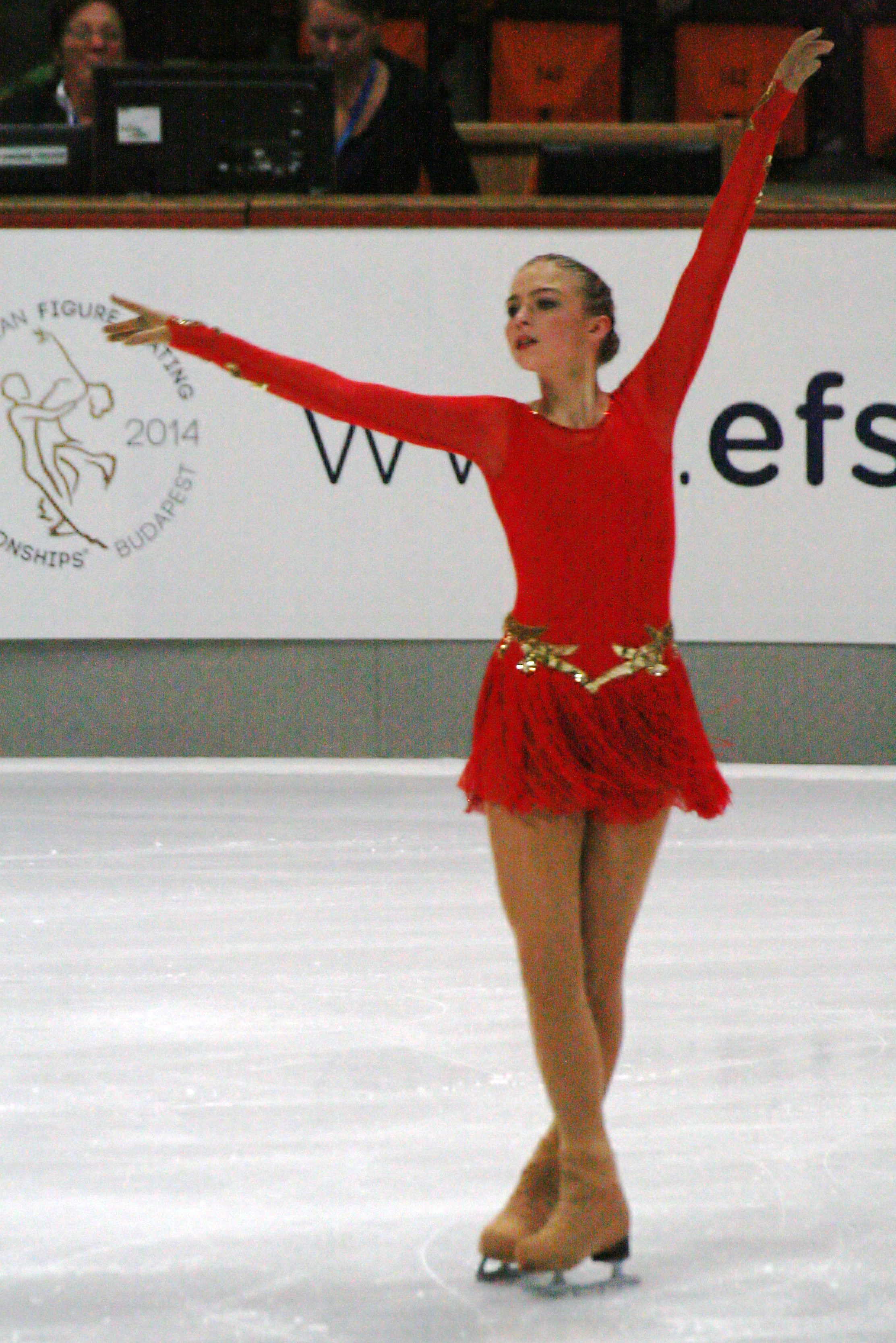 Инга Янулевичуте (Литва) на 2013 Nebelhorn Trophy.